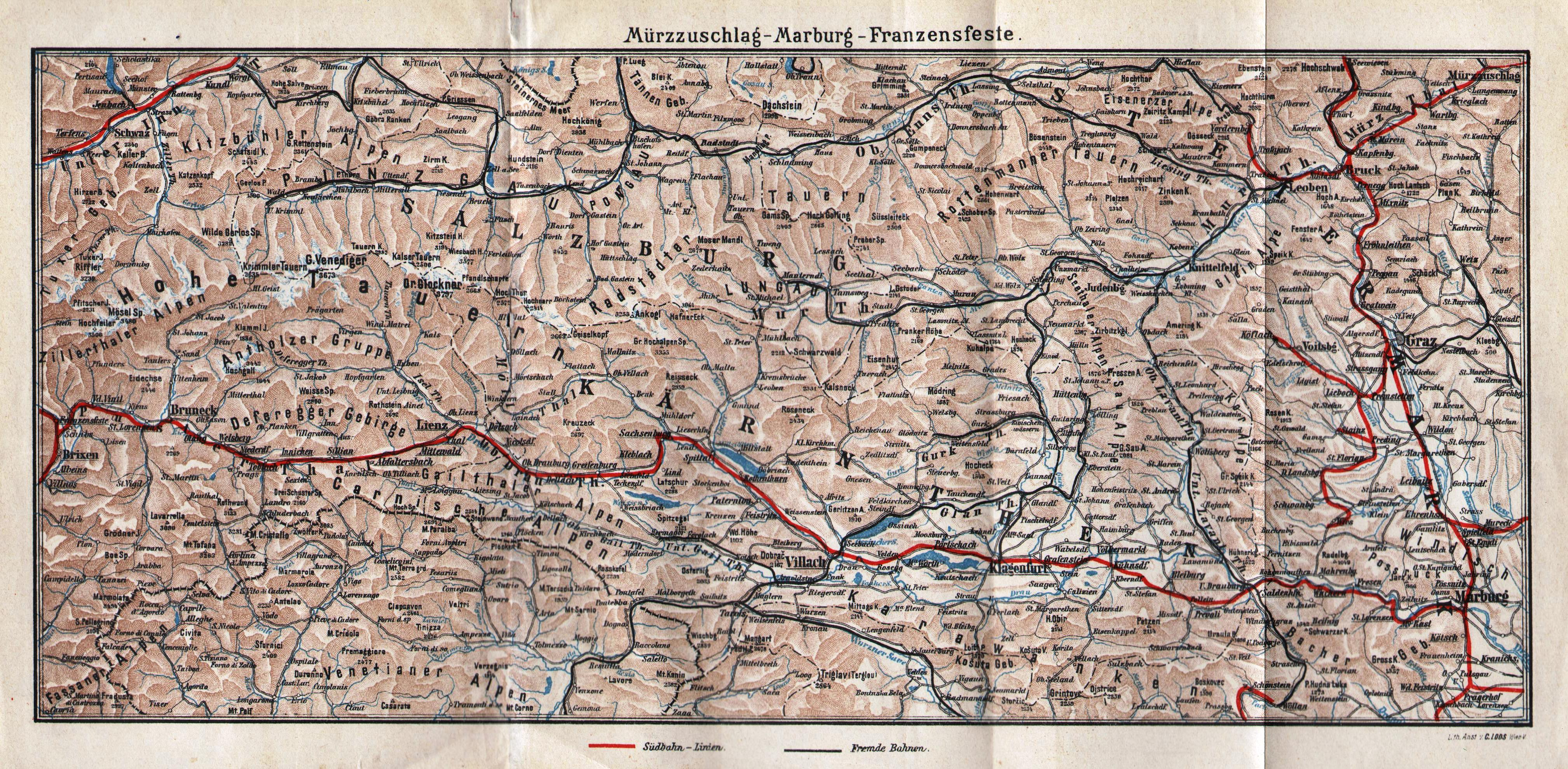 Landkarte der Südbahnstrecke von Mürzzuschlag - Marburg